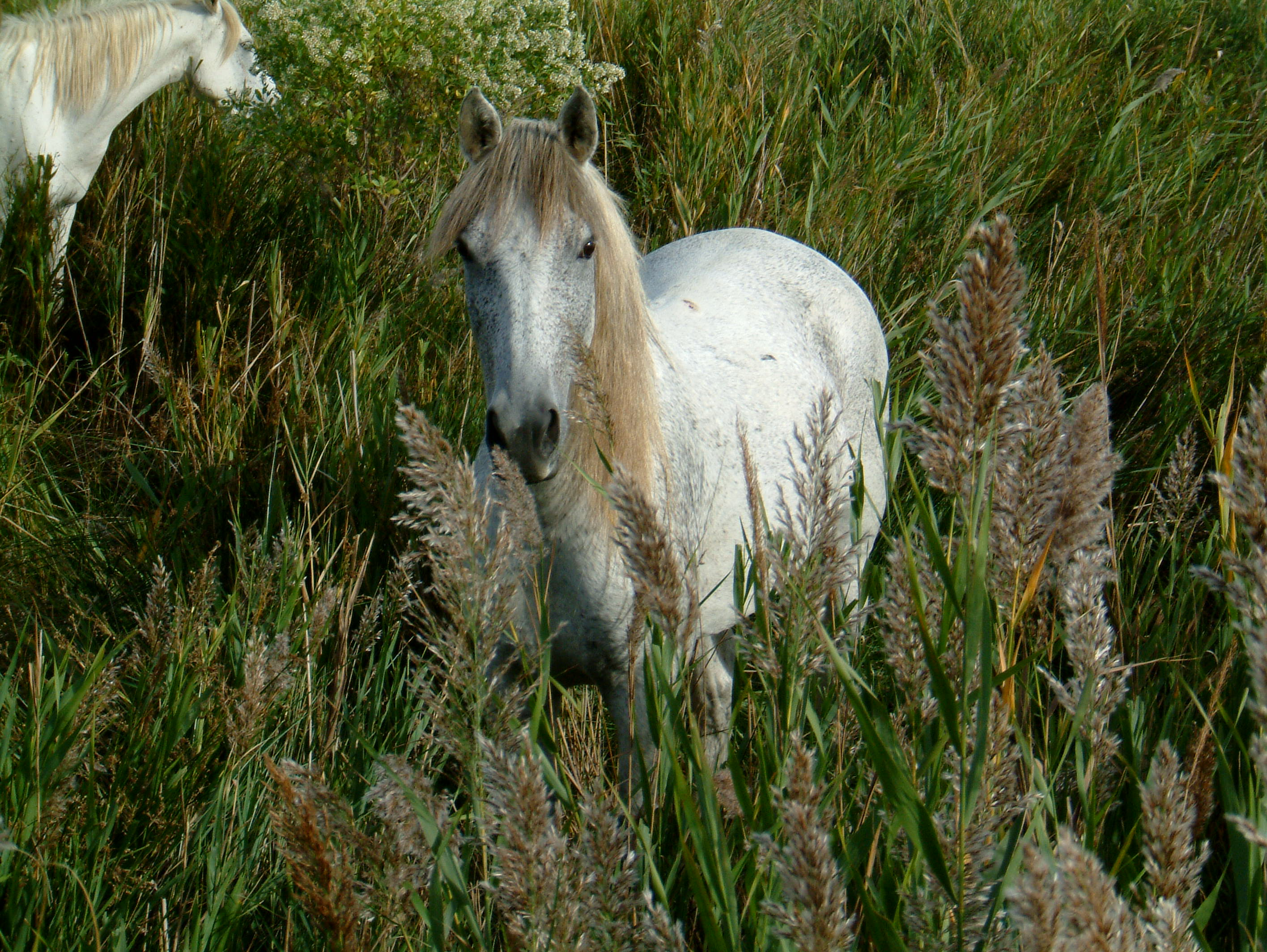 Camargue-Pferde, aufgenommen in der Camargue ca. 5 km landeinwärts von Saintes-Maries-de-la-Mer.